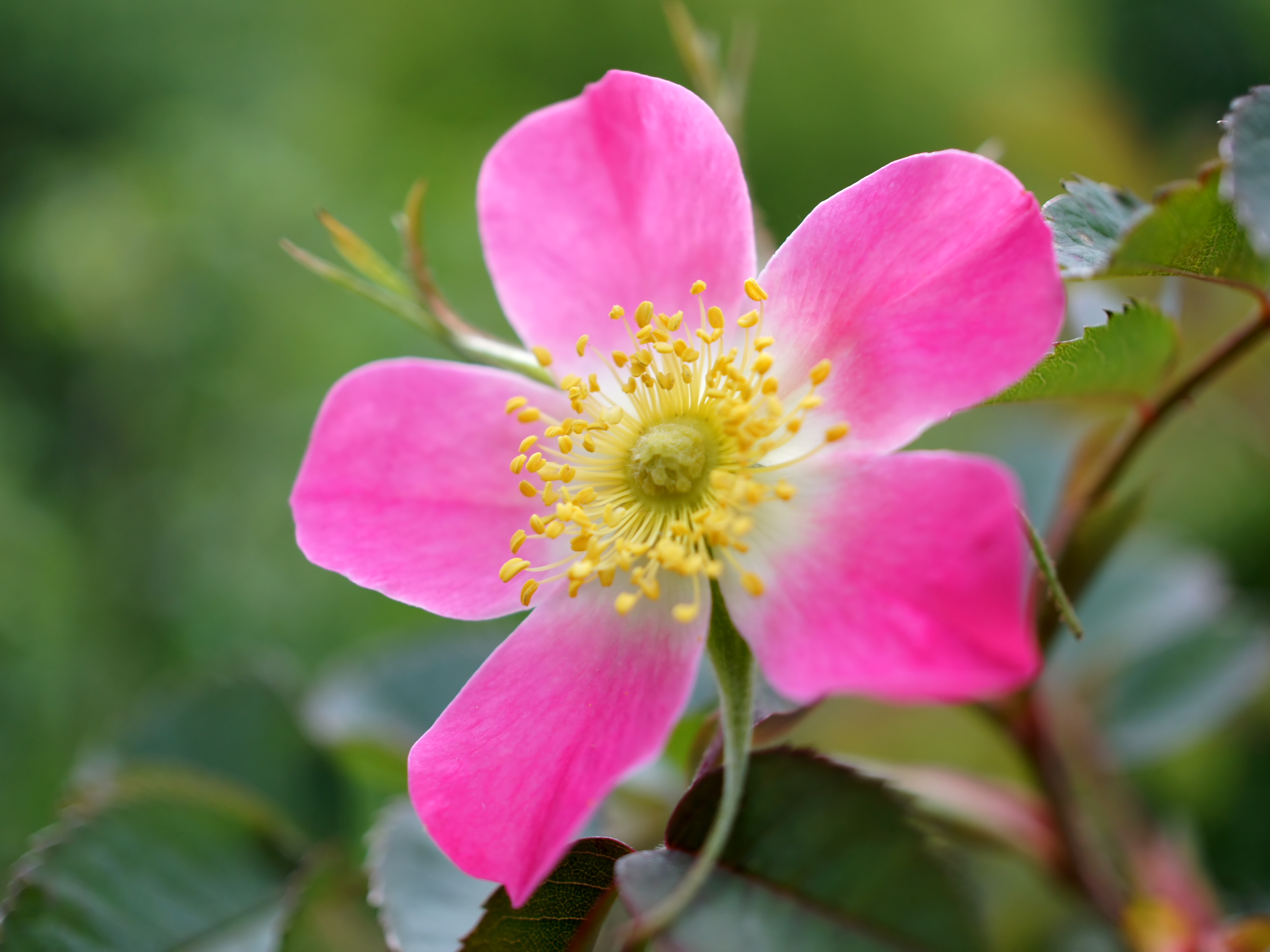 Rose Rosa cv. Carmenetta バラ ロサ・カルメネッタ C.E.Farm 1923